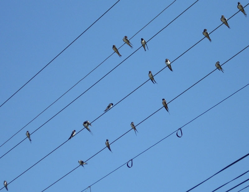 Rândunele Hirundo rustica fotografiate la Chevereșu Mare, în vara 2007.